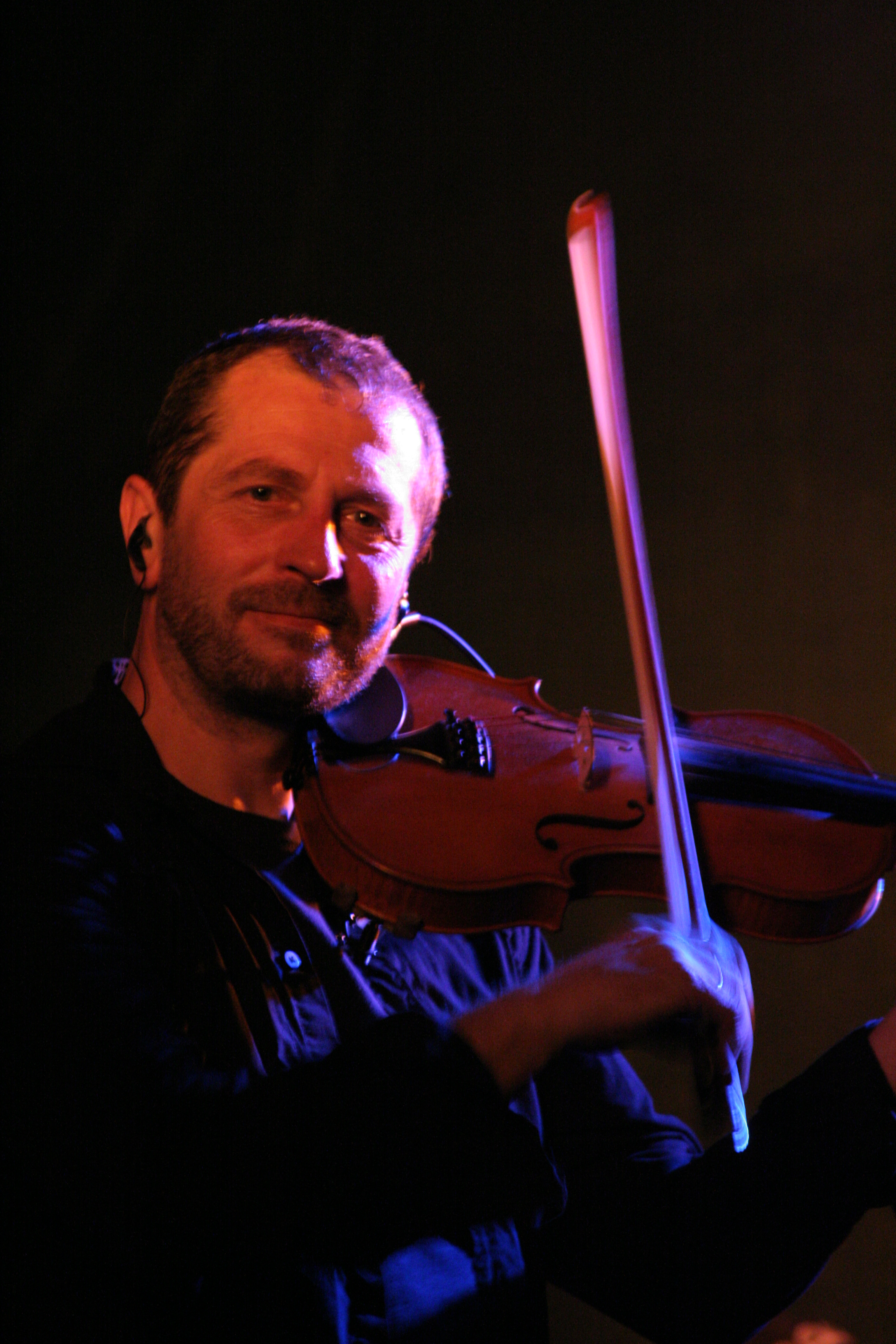 Karel Holas, Čechomor concert